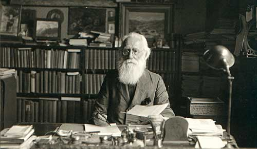 Thomas Mower Martin at his desk, Toronto, Ontario, aged about 75